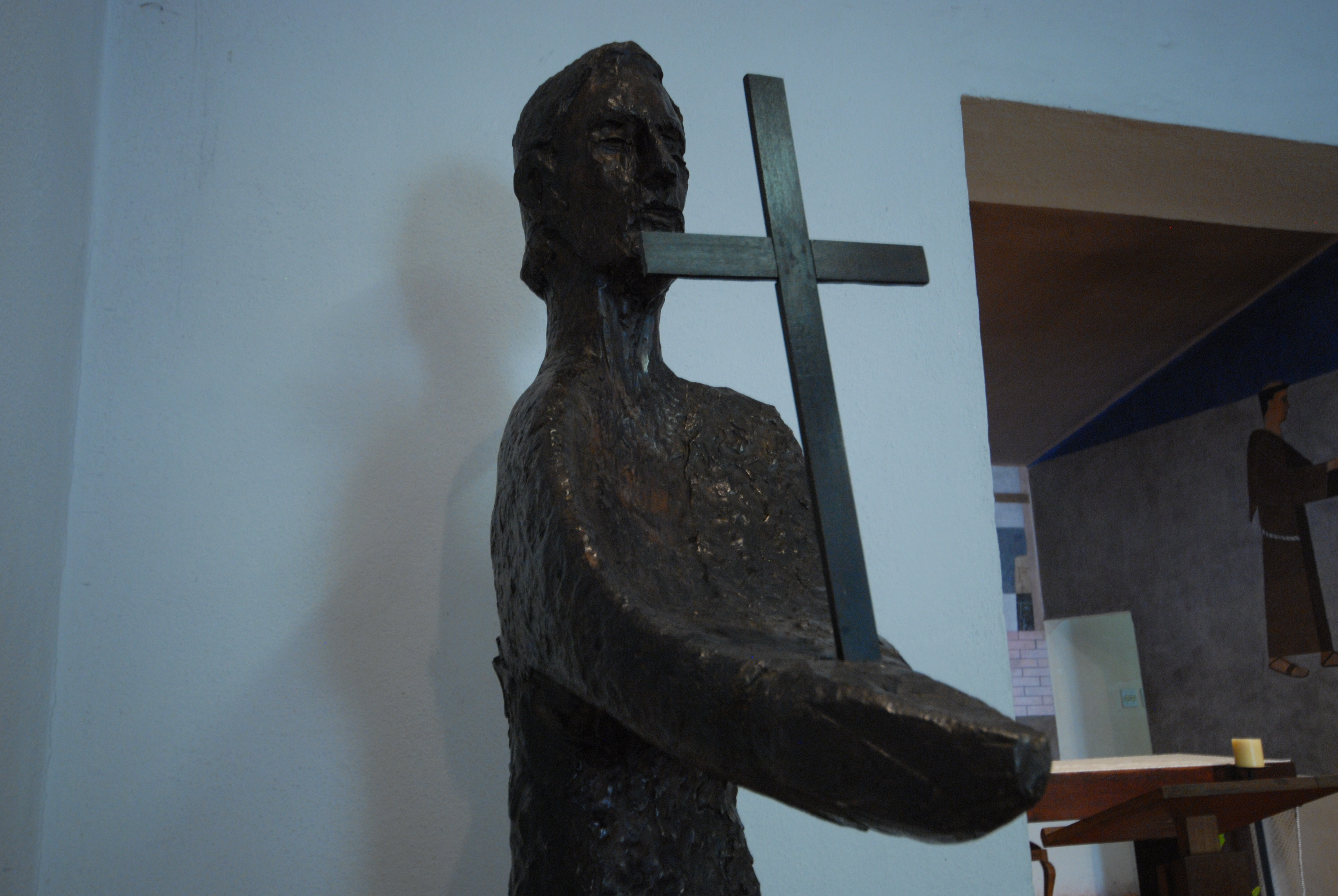 Detalhe de escultura de São João Batista, na Capela do Cristo Operário